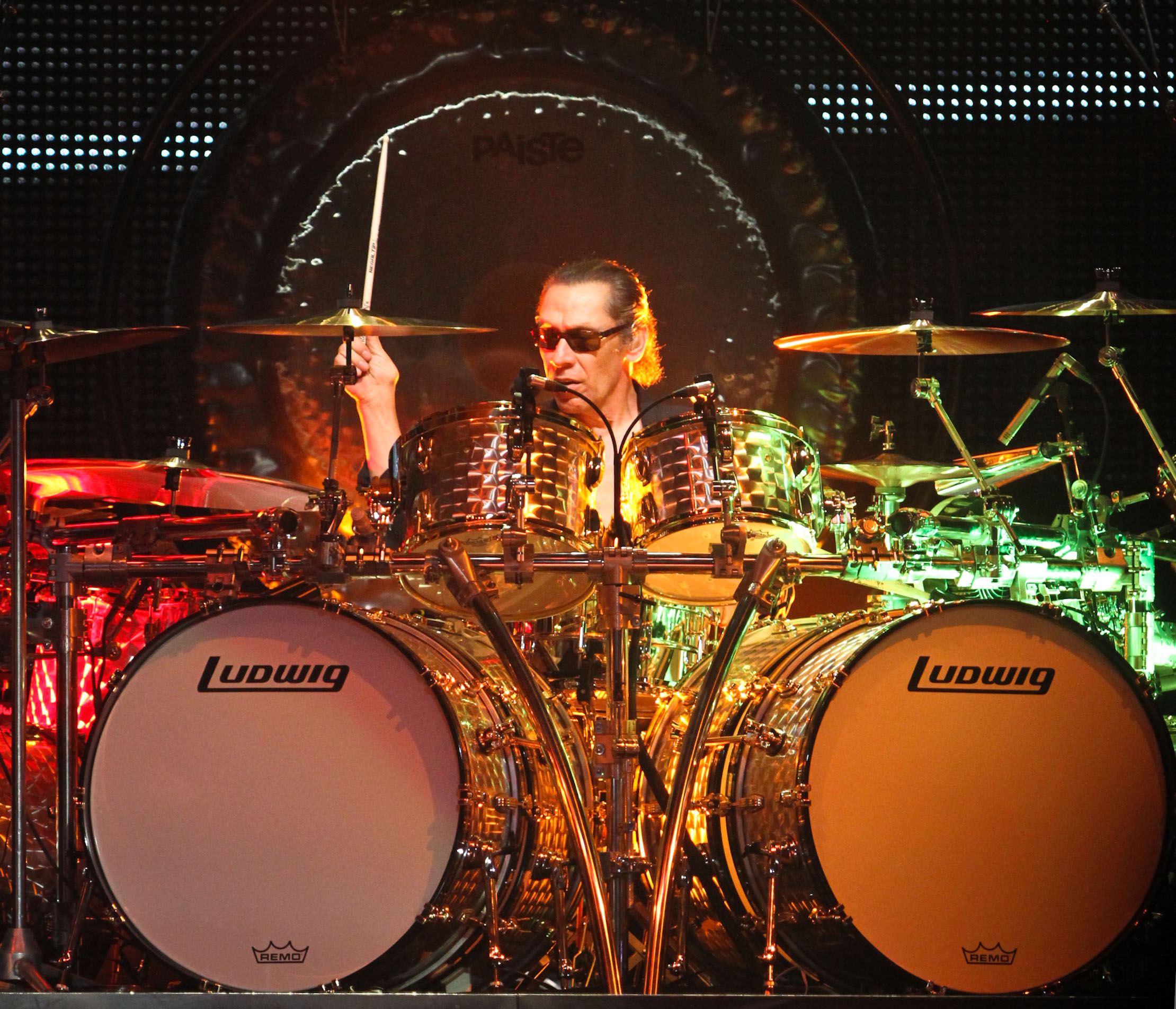 Alex Van Halen performing live (2012).